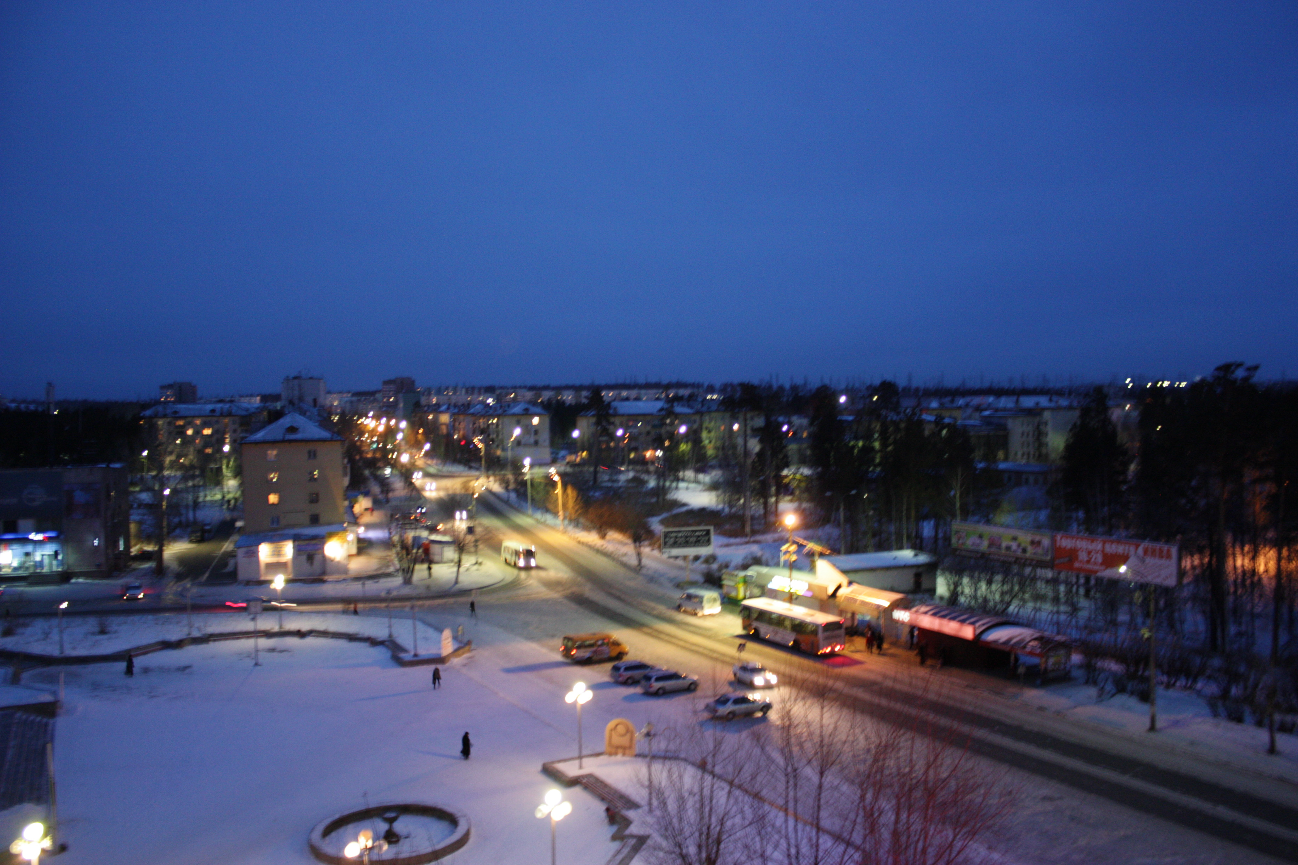 Bratsk, Irkutsk Oblast, Russia